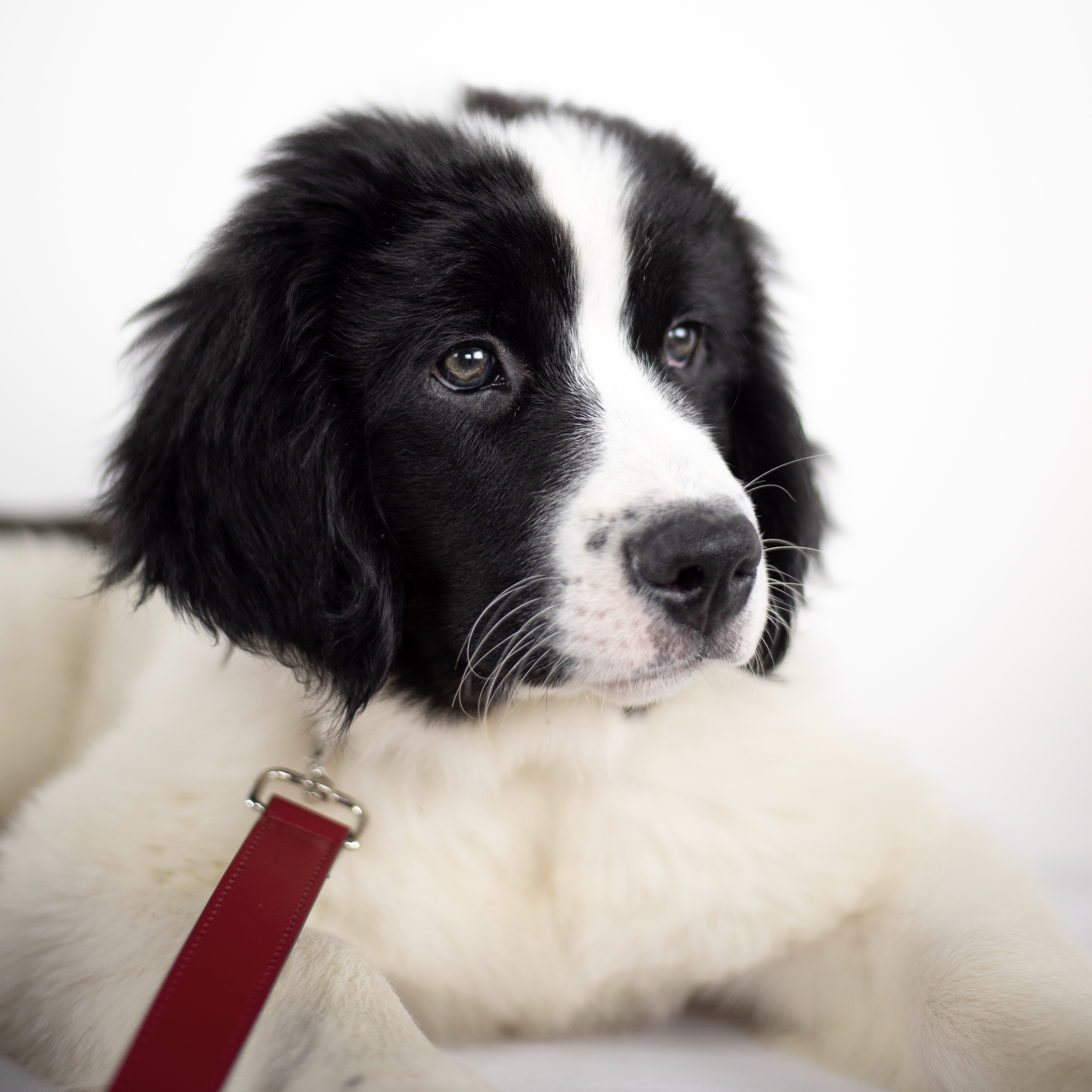 Puppy landseer - 3 months old